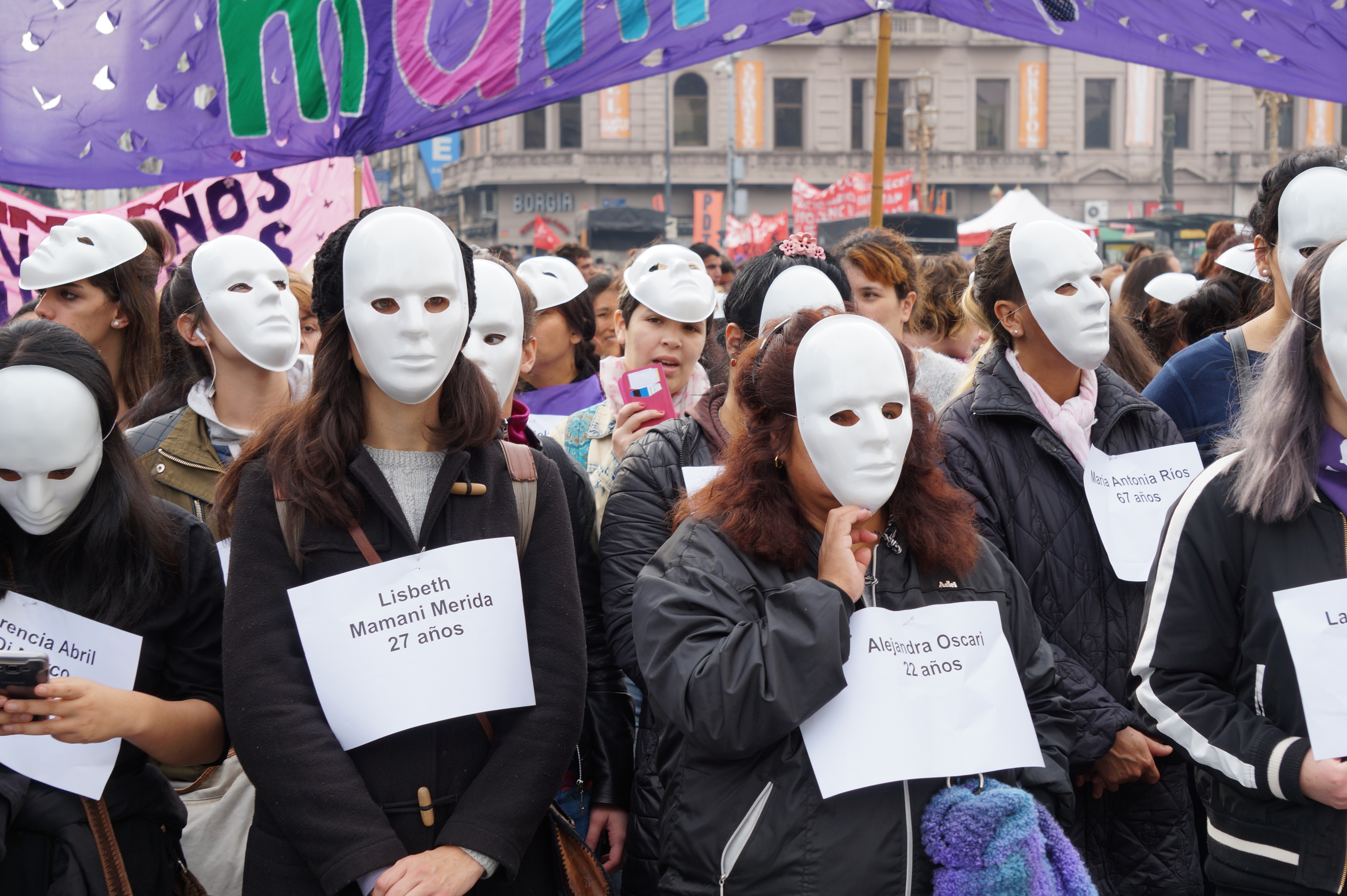 Ni una menos, Buenos Aires, Argentina